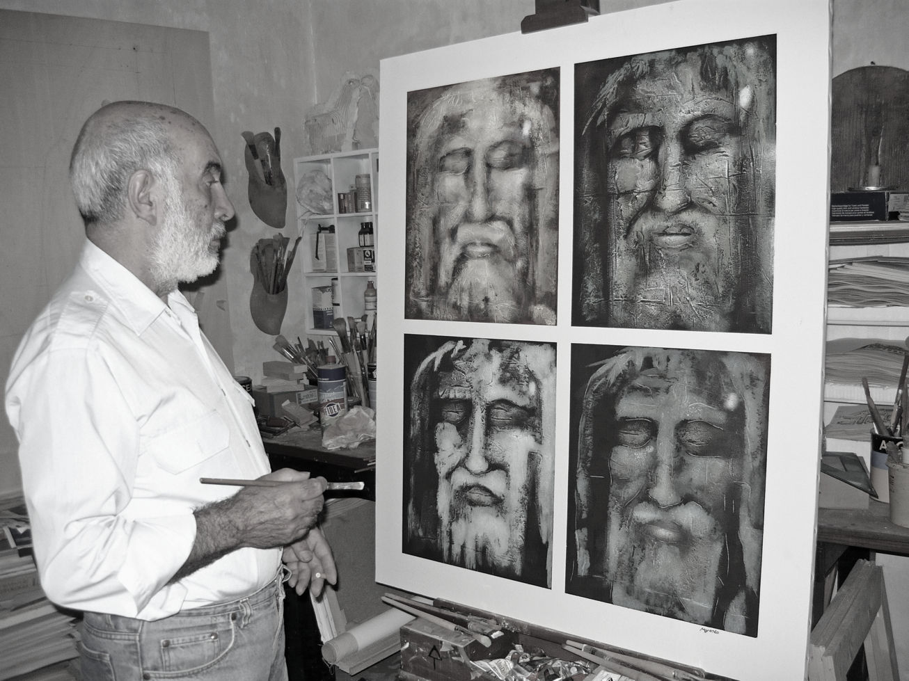 Vincenzo Musardo "Sacra Sindone"